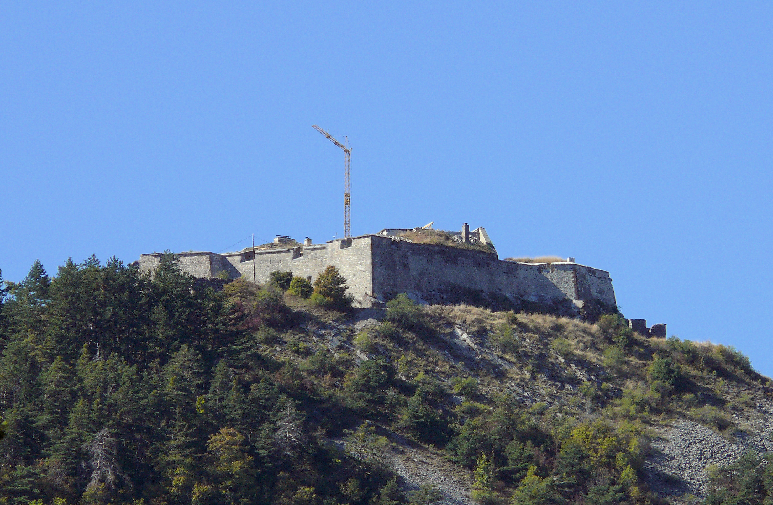 Saint-Vincent-les-Forts - Fort Joubert vu de la D900